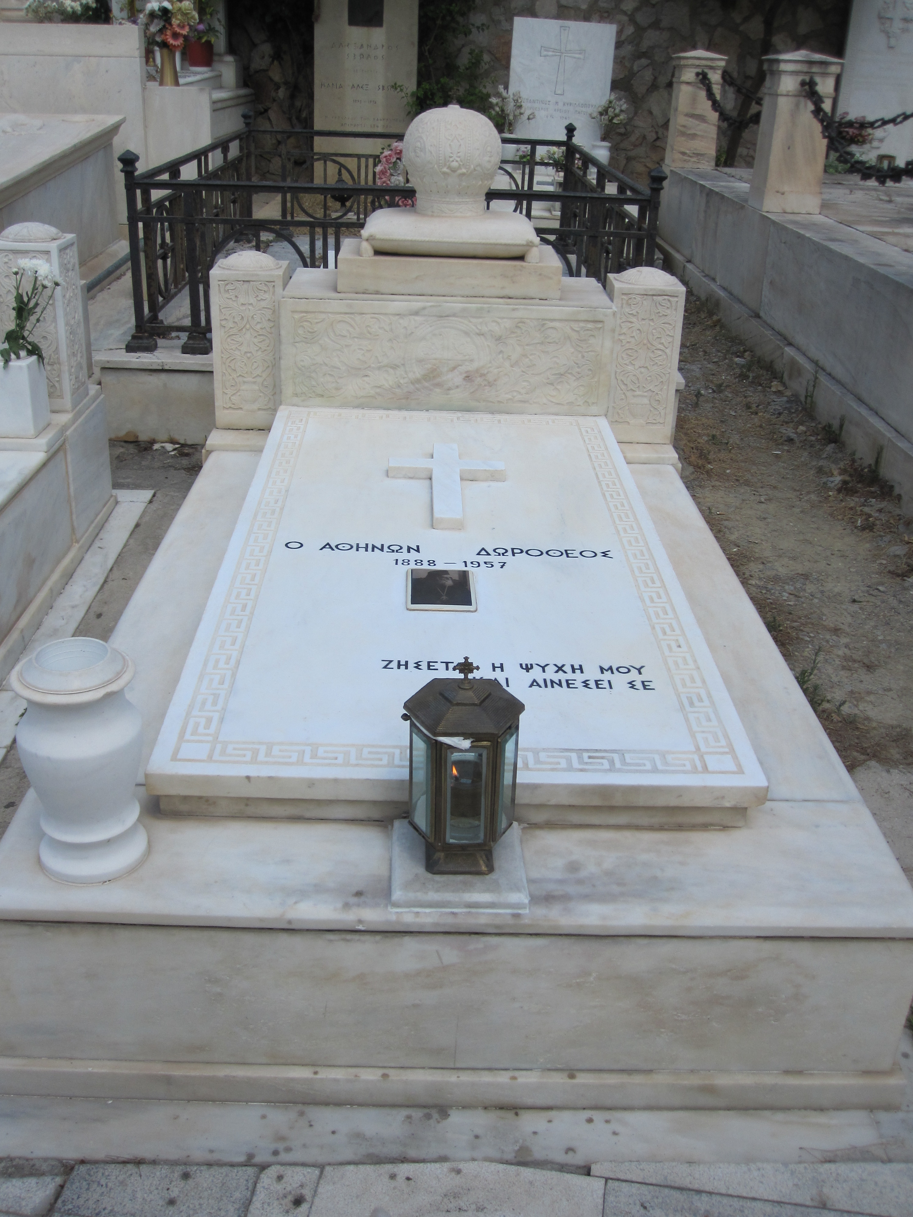 Гробница архиепископа Афинского Дорофея